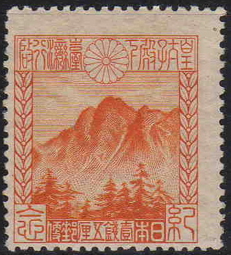 皇太子時代の昭和天皇台湾行啓記念切手。東京中央郵便局及び台湾総督府管内の郵便局でのみ限定発売された。